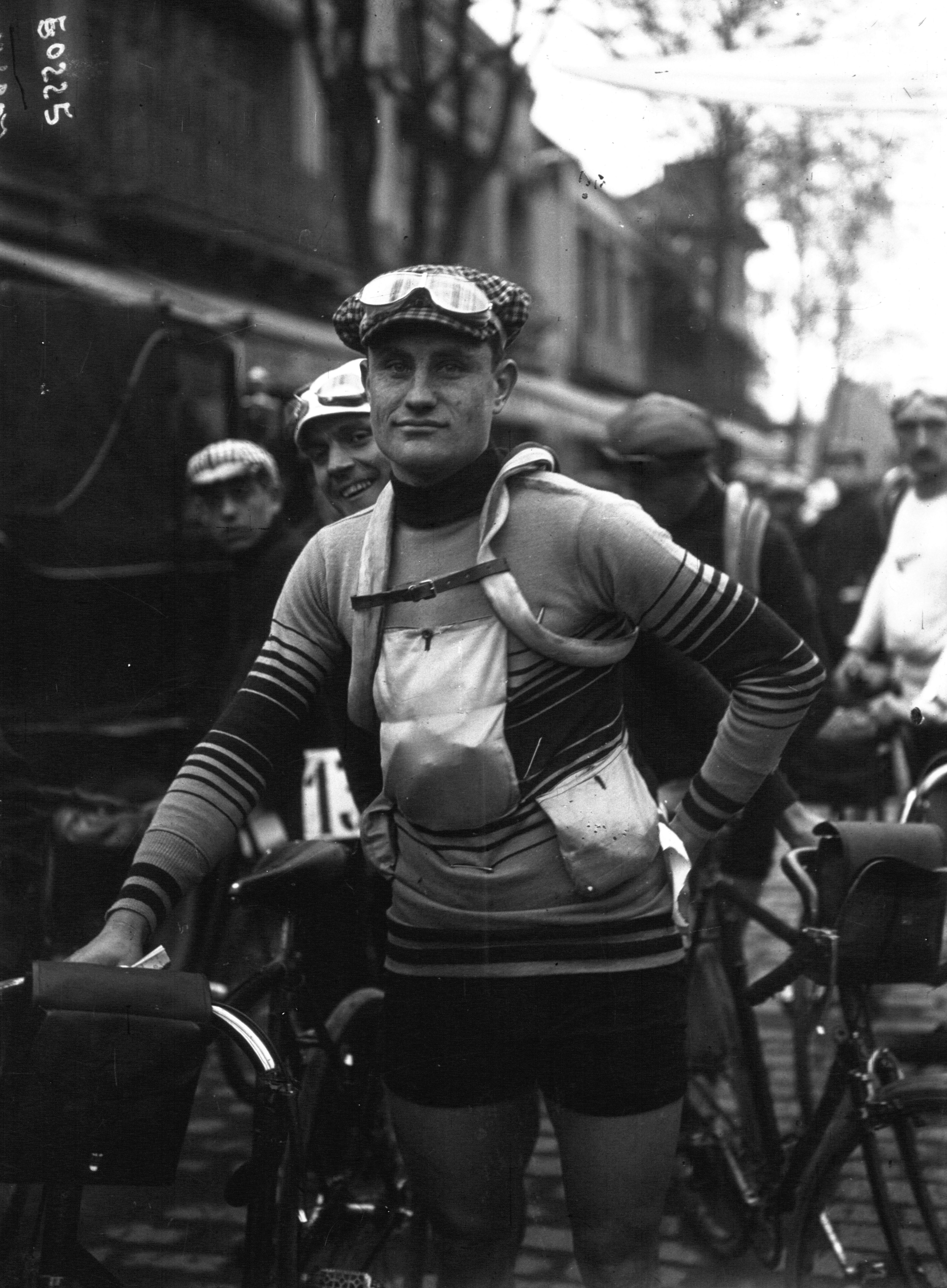 Charles Deruyter - Paris Roubaix 1914.Bibliothèque nationale de France